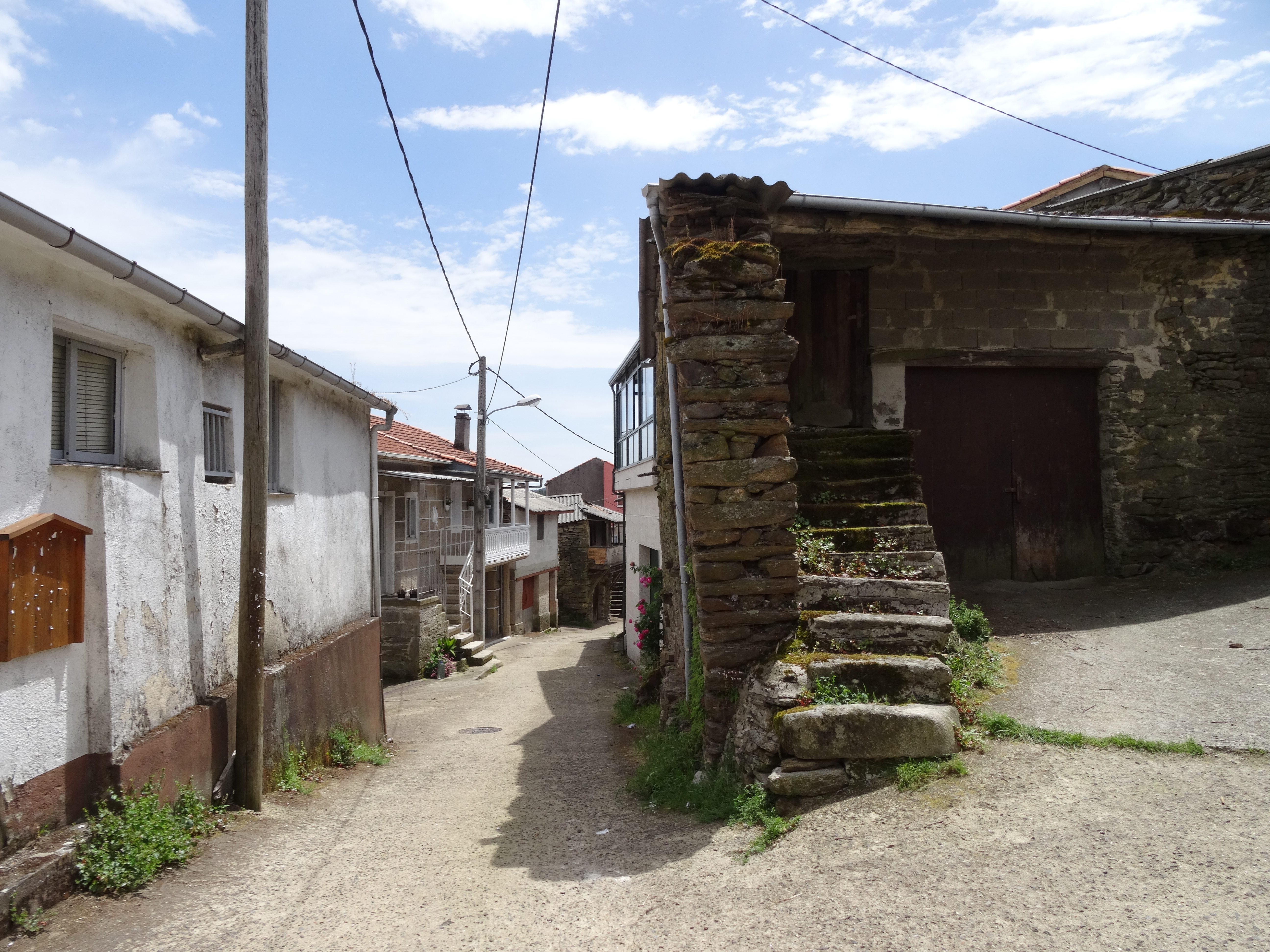 Ver título.